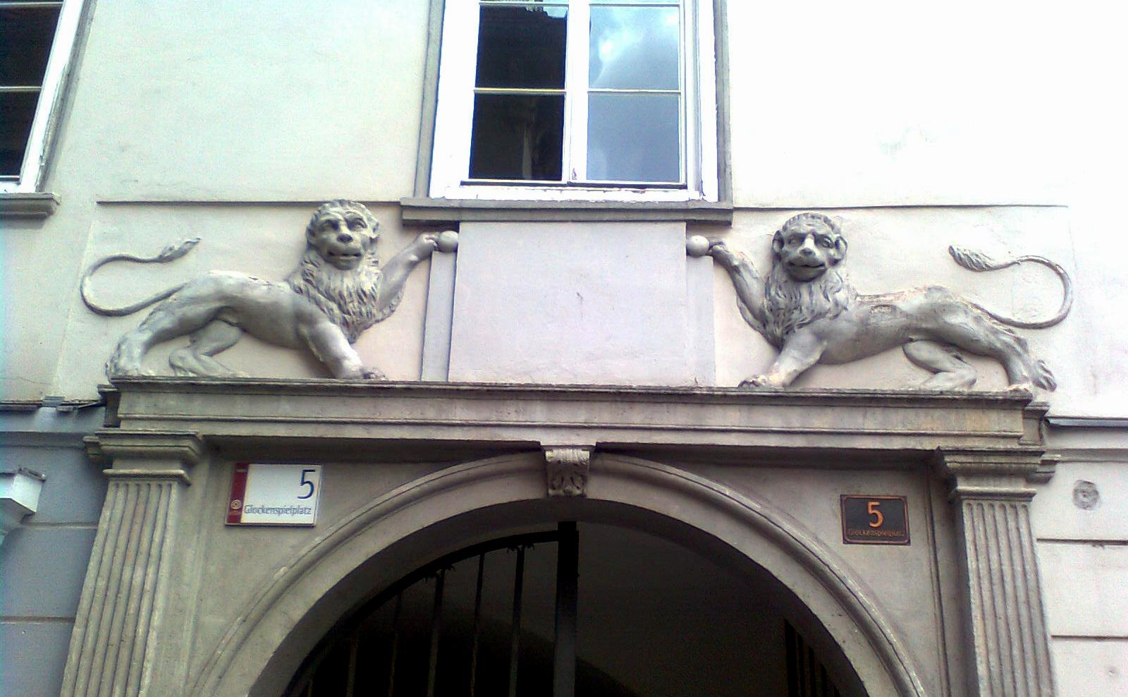 Portaldetail des Palais des Enffans d´Avernas in Graz